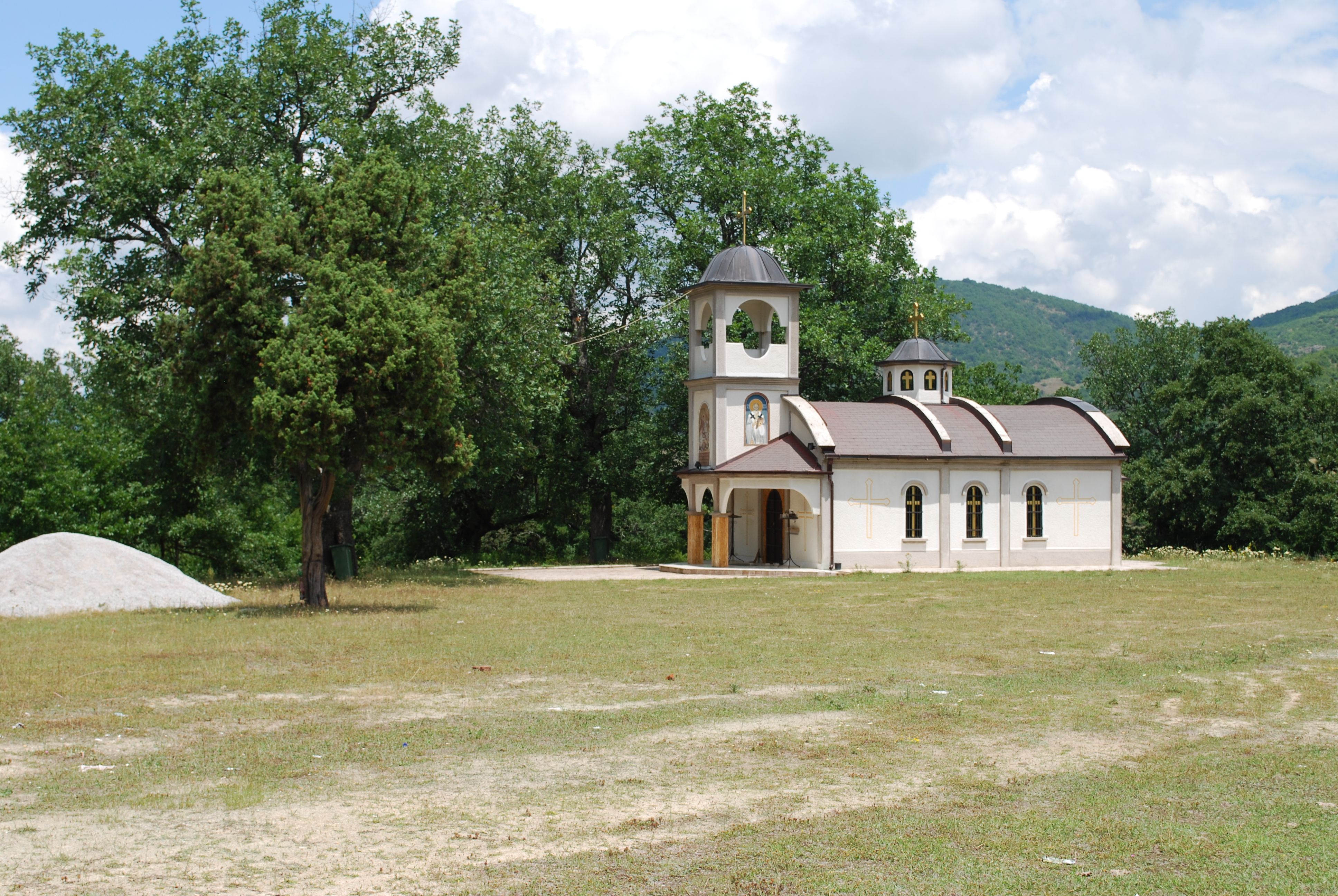 Манастирот „Св. Георги“ -Волковија, Тетово